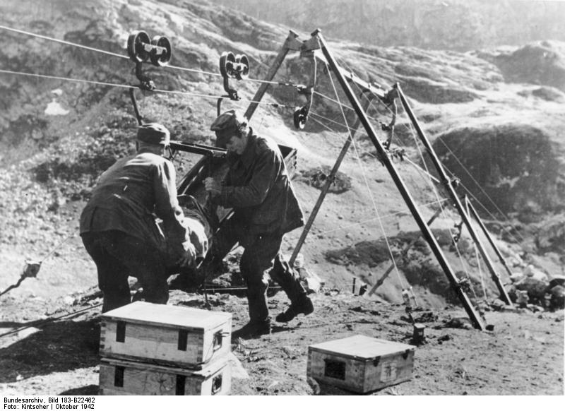 Scherl: Zur schnelleren Abwicklung des Transports benutzen unsere Gebirgs-Pioniere eine transportable Spezialseilbahn, die in den Bergen des Kaukasus hervorragende Dienste leistet. Kriegsberichter Kintscher 20.10.42 [Herausgabedatum]